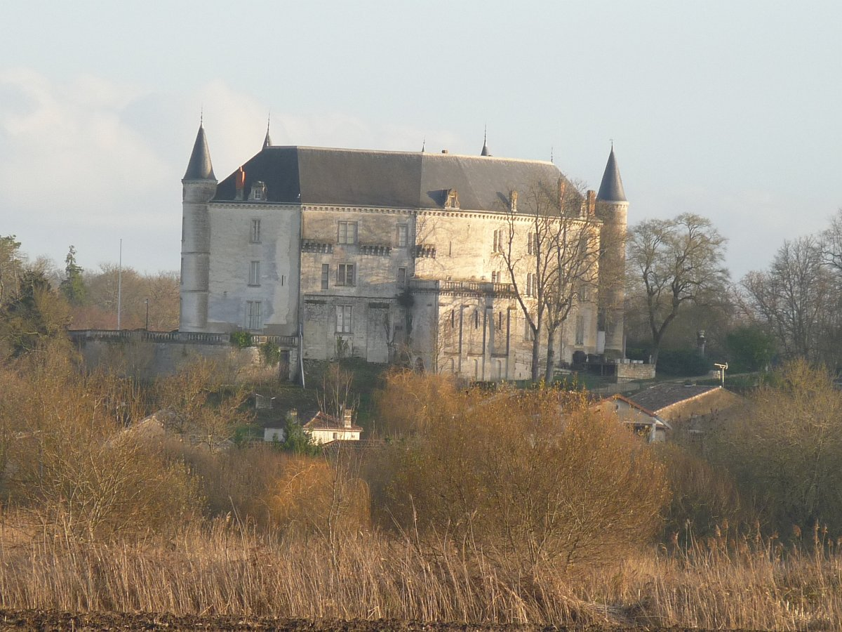 Château de la Rochandry, façade est, Mouthiers-sur-Boëme, Charente, France